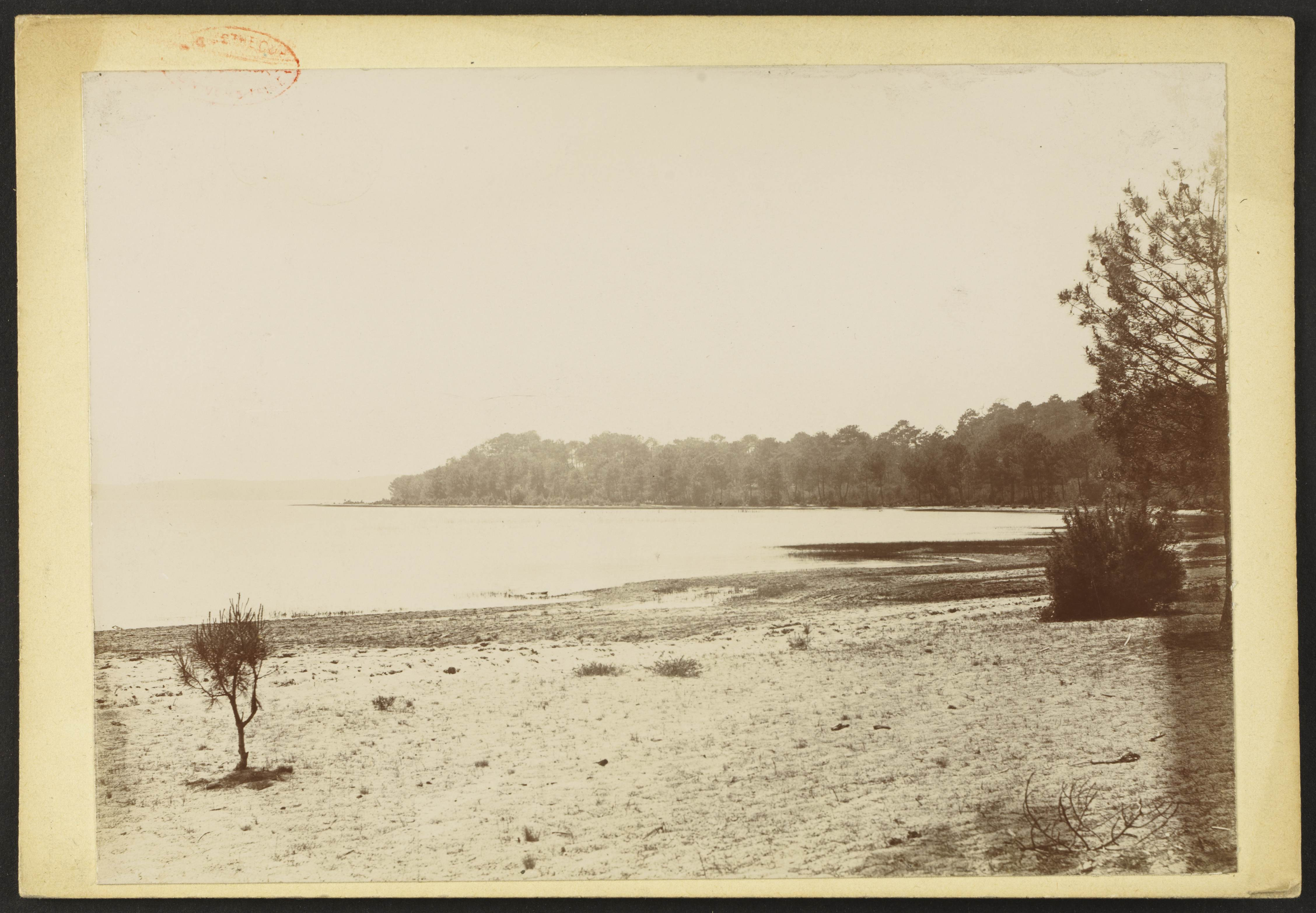 Étang de Cazaux et de Sanguinet